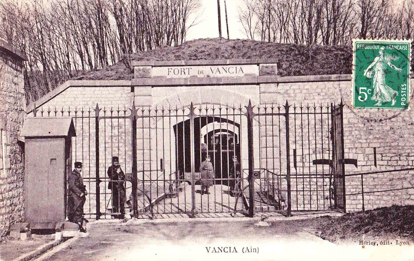 Carte postale ancienne du fort de Vancia. Mention Vancia (Ain) Vancia est est hameau de Miribel (Ain) avant de devenir un quartier de Rillieux-la-Pape en 1968.